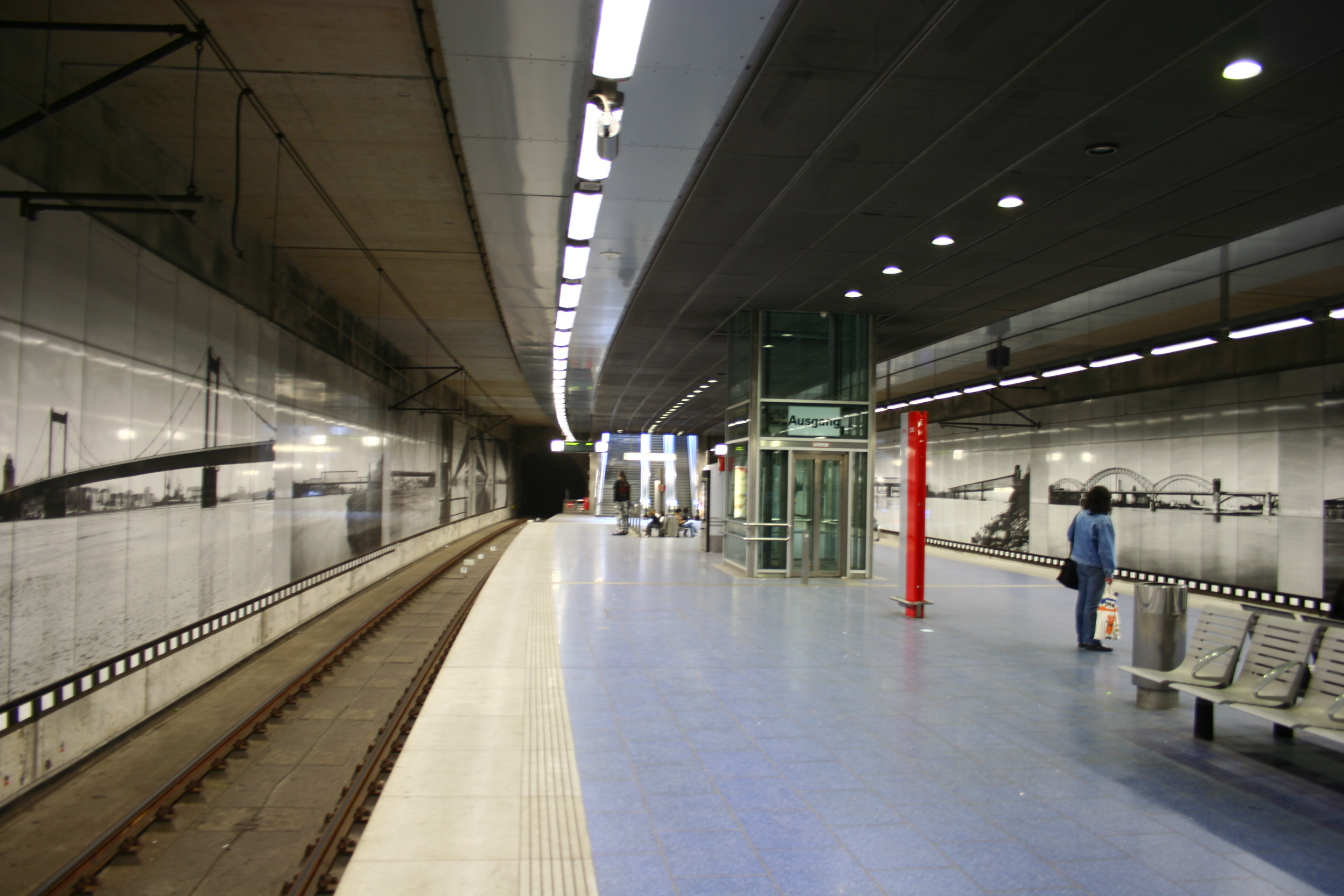 U-Bahnhof Meiderich Bf der Stadtbahn Duisburg